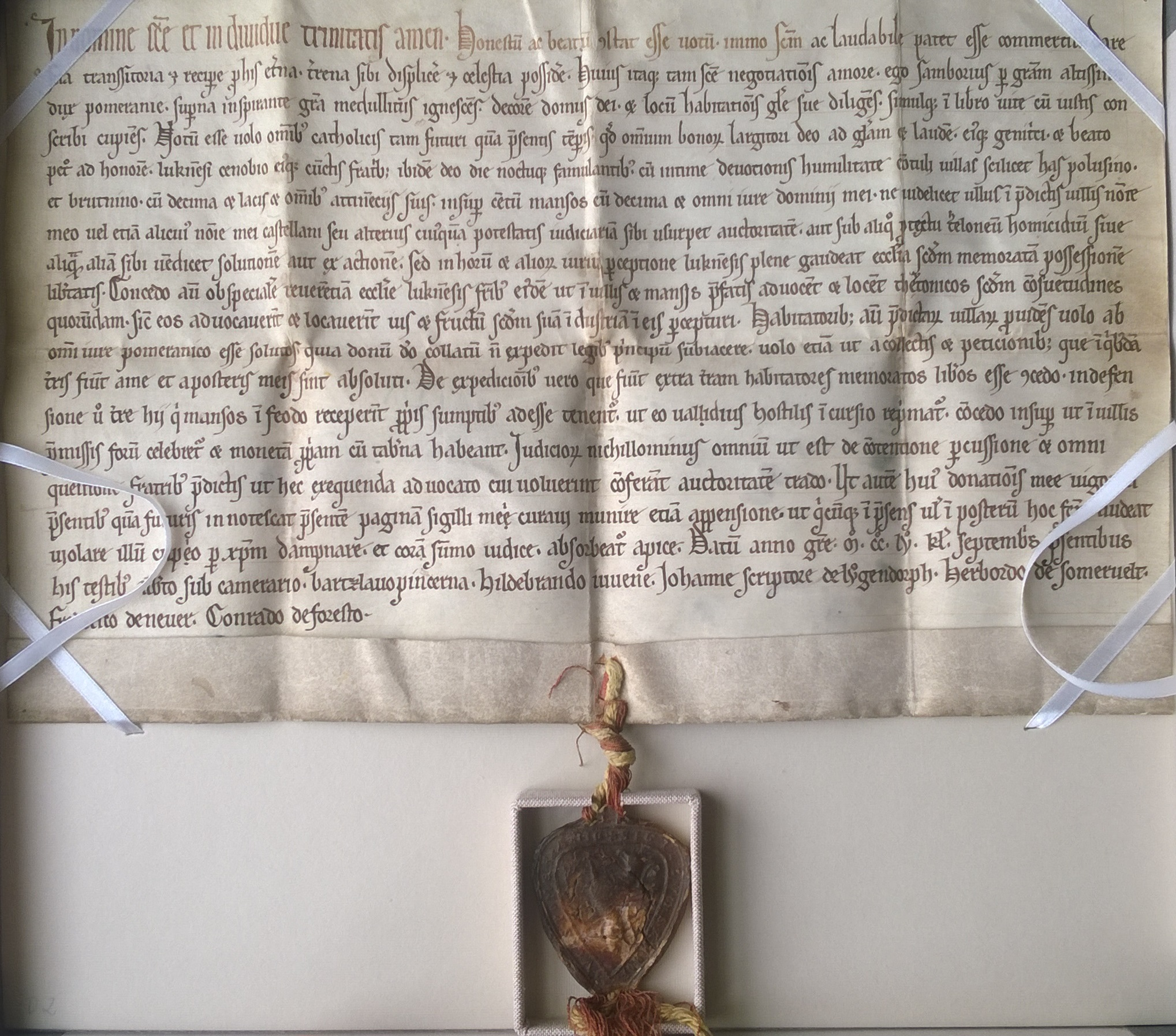 Sambor, książę pomorski na Lubiszewie, nadaje klasztorowi w Łeknie wsie Polusino [Połęczyn] i Brutnino na Pomorzu Gdańskim, wolne od ciężarów oraz 100 włók z dziesięciną. Datum anno gracie M.CC.LV, Kalendas Septembris.